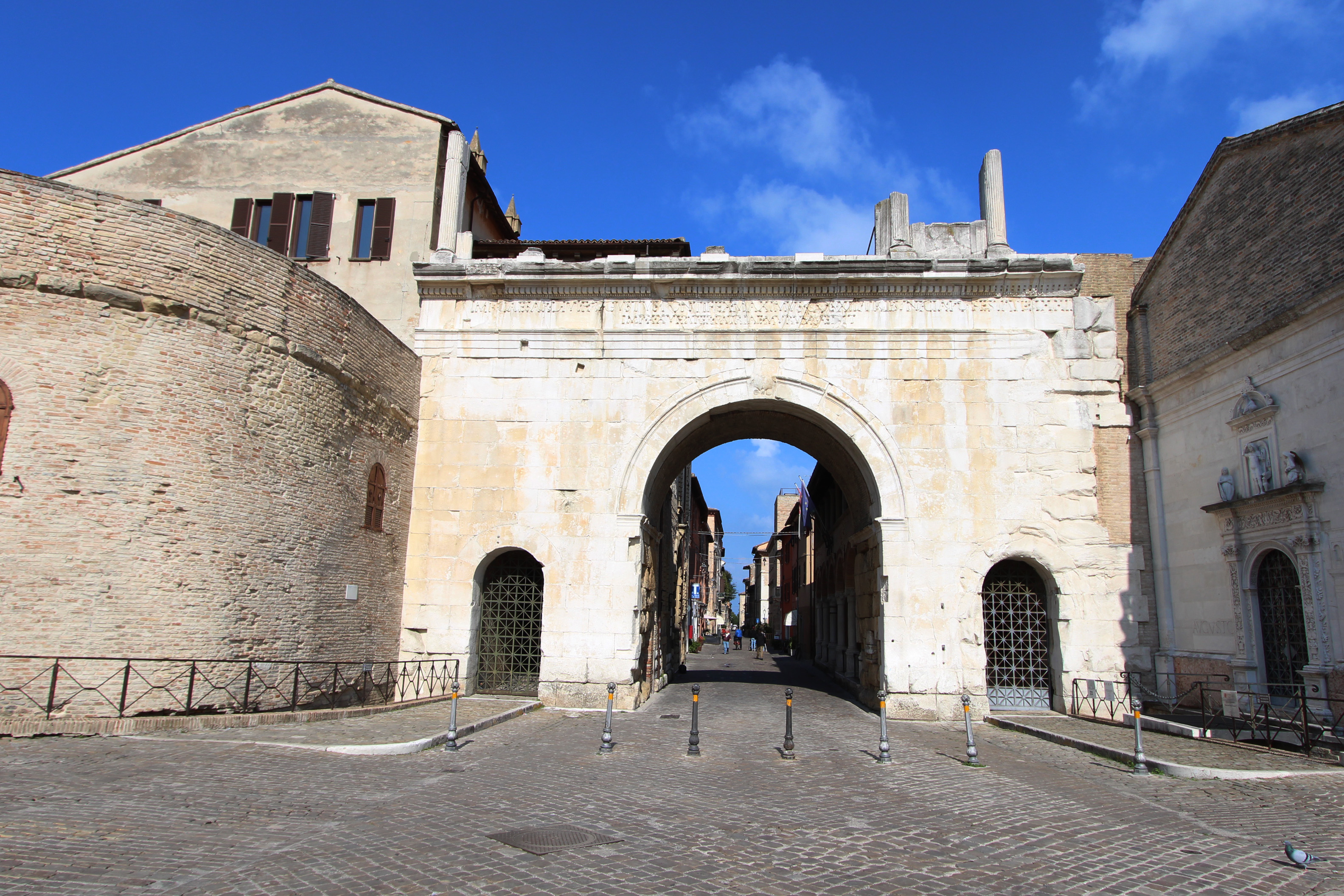 Prospettiva frontale This is a photo of a monument which is part of cultural heritage of Italy.